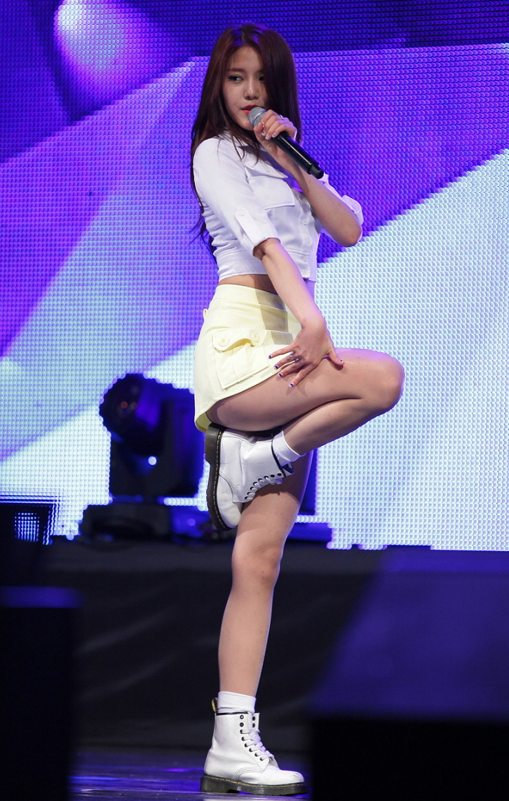 AOA 홍천 군인의날 화합한마당 part.2